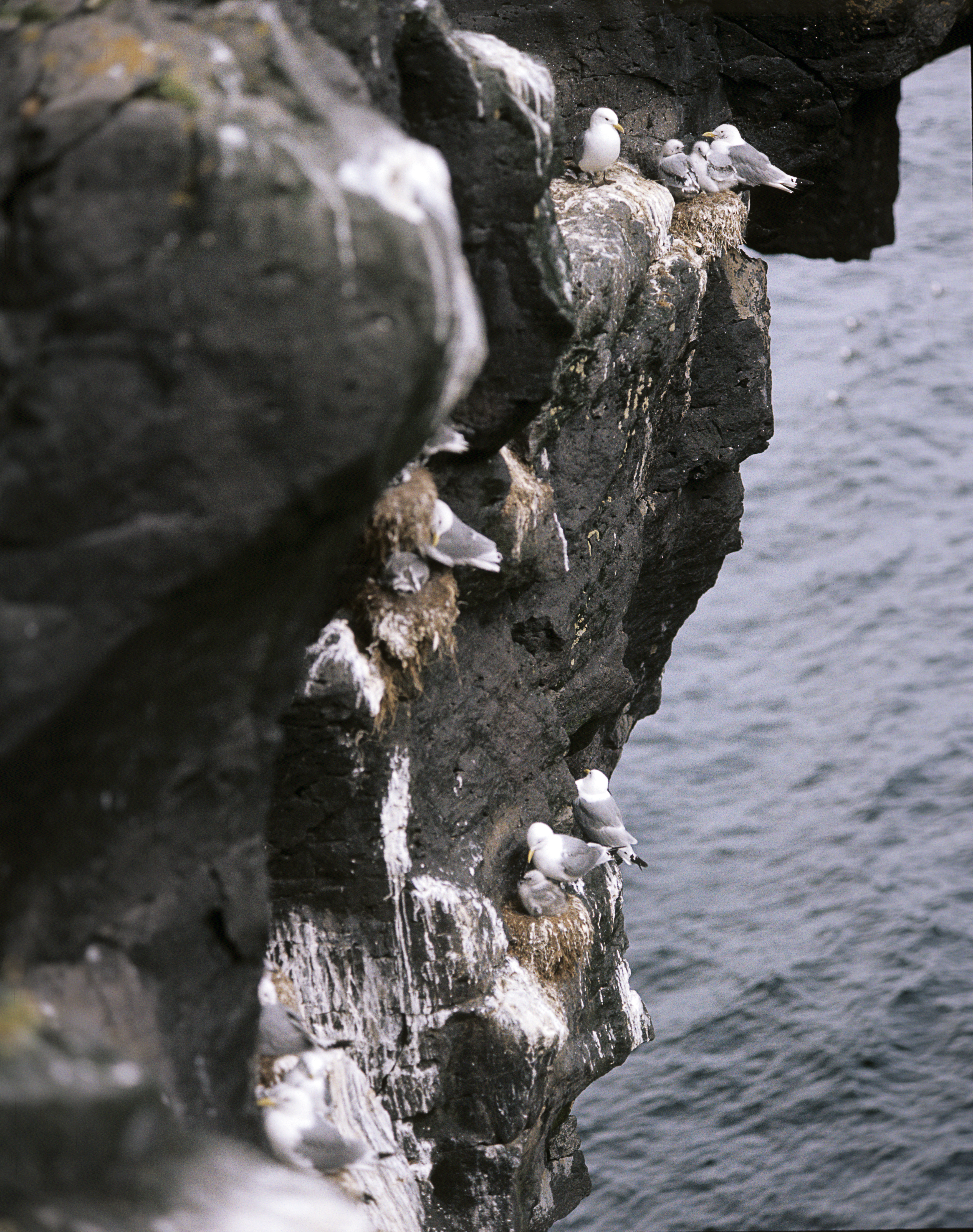 Arnastapi, Vogelfelsen